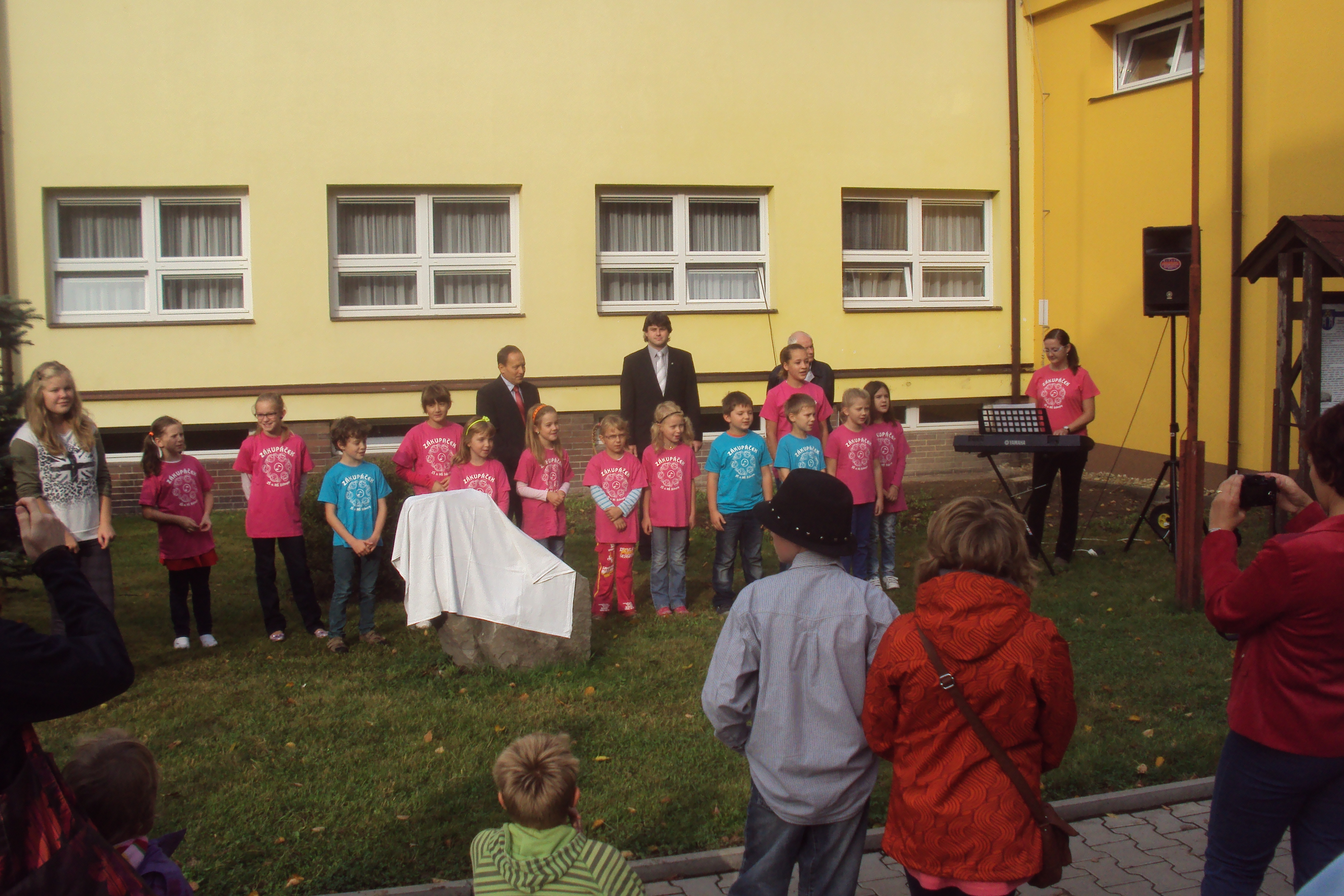 Slavnostní odhalení pomníku školy